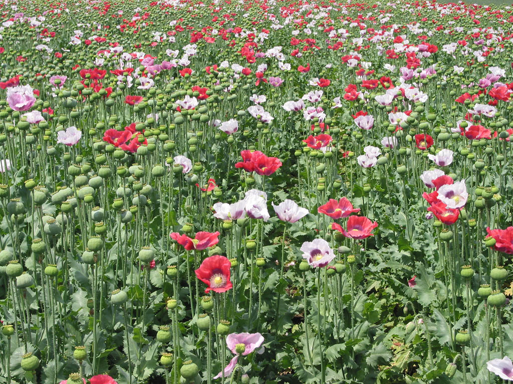 Mohnfeld bei Armschlag, Waldviertel, Österreich